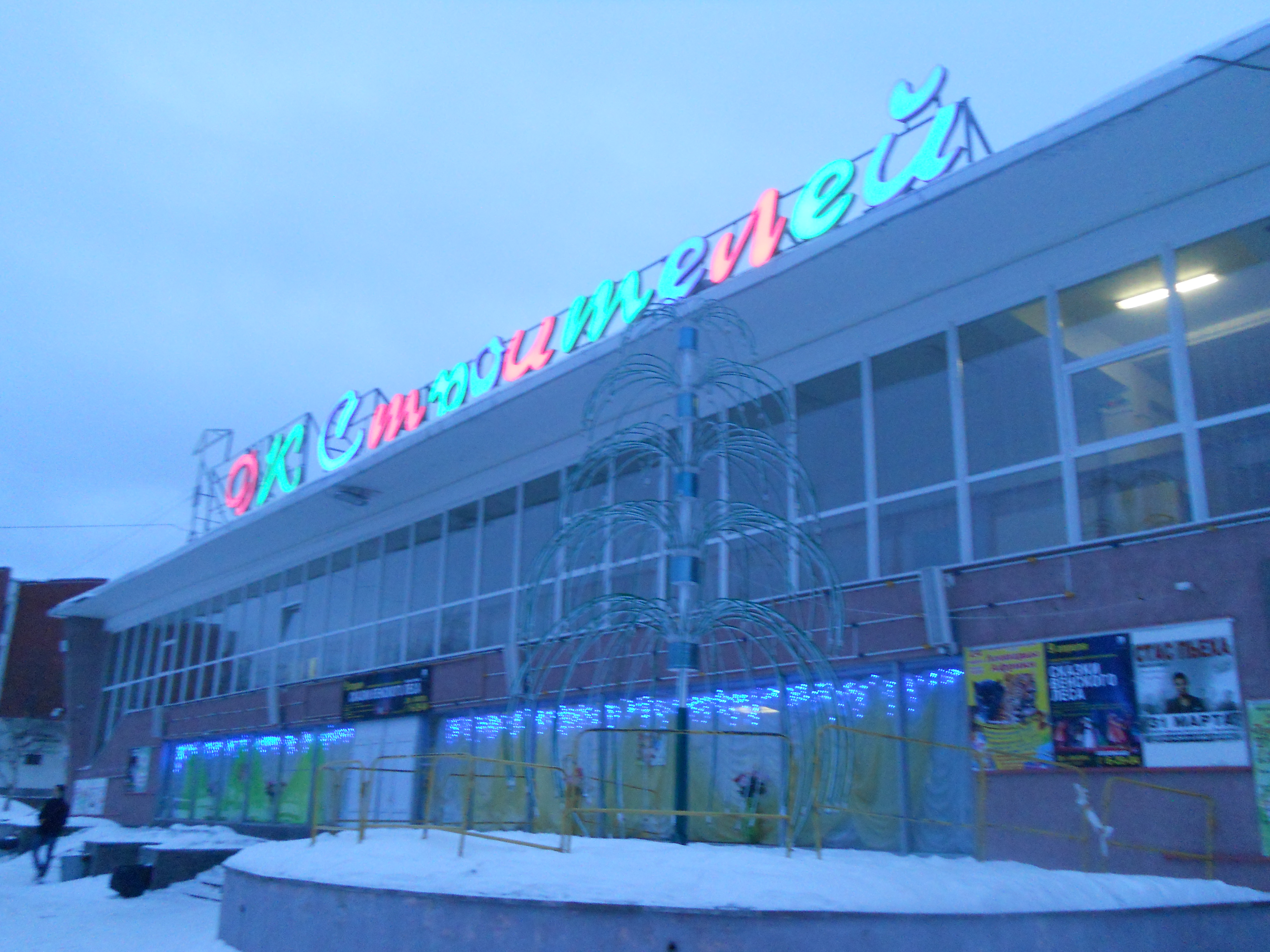 ДК им. Егорова